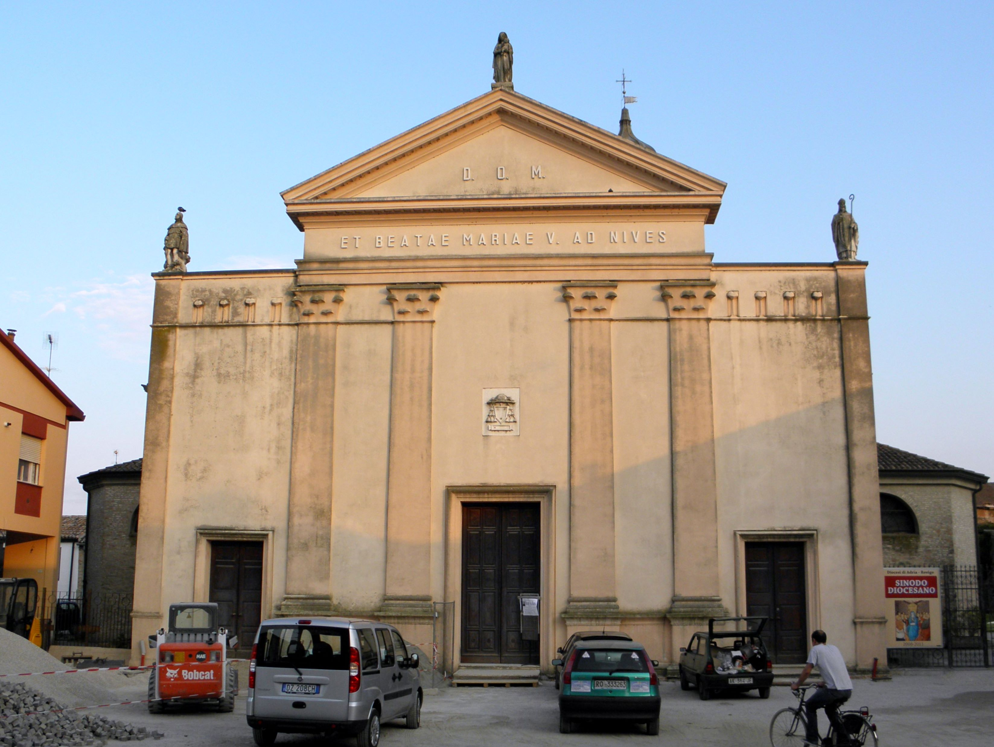 Ariano nel Polesine: chiesa parrocchiale di Santa Maria della Neve.